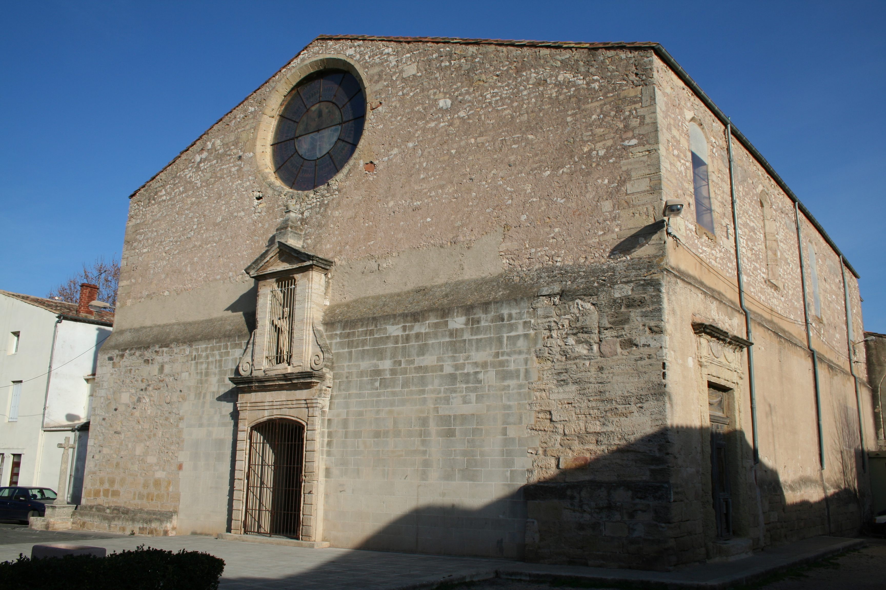 Florensac (Hérault) - Église paroissiale Saint-Jean-Baptiste (vue générale).